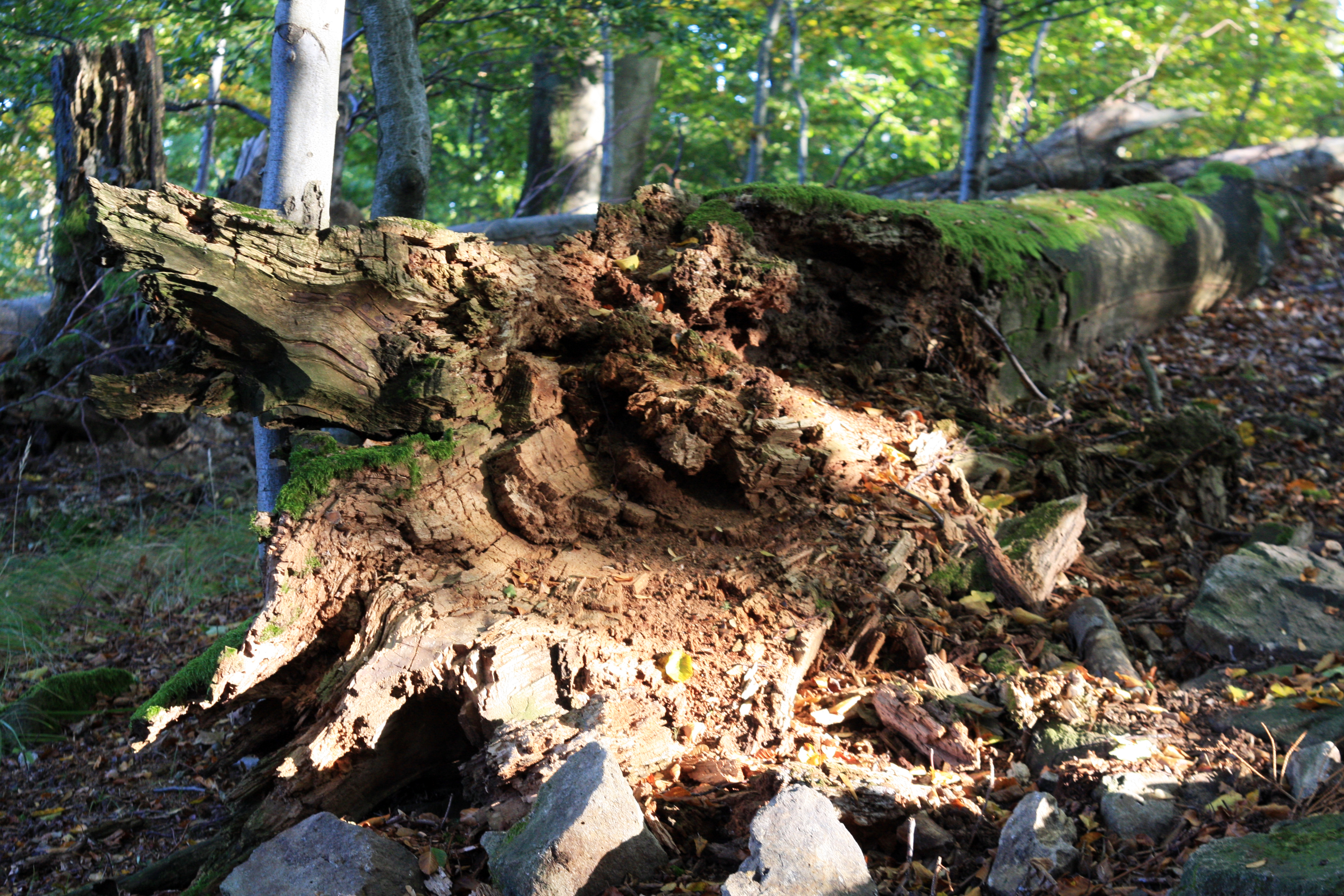 padlé kmeny podléhají přirozenému rozkladu